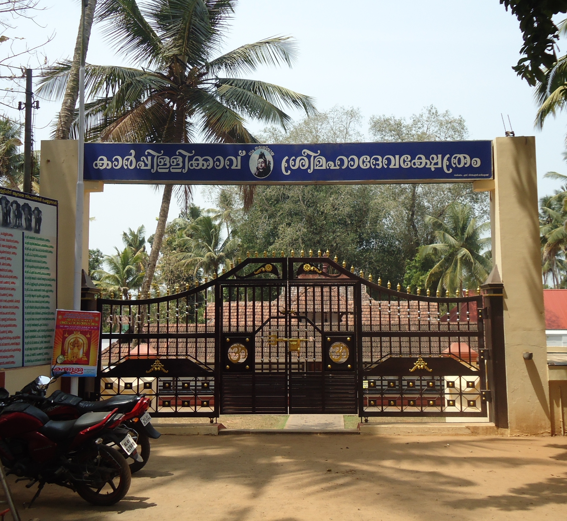 Karppillikavu Sree Mahadeva Temple Manjapra Gate